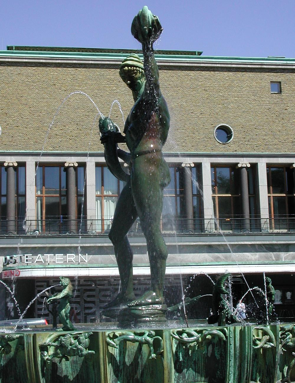 Carl Milles Poseidon, sedd ur en lustig vinkel. Fotograf: Pär Henning Datum: 2004-06-01 2 juni 2004 kl.19.16 P g henning 1000x1300 (266335 bytes) (Carl Milles Poseidon, sedd ur en lustig vinkel.)